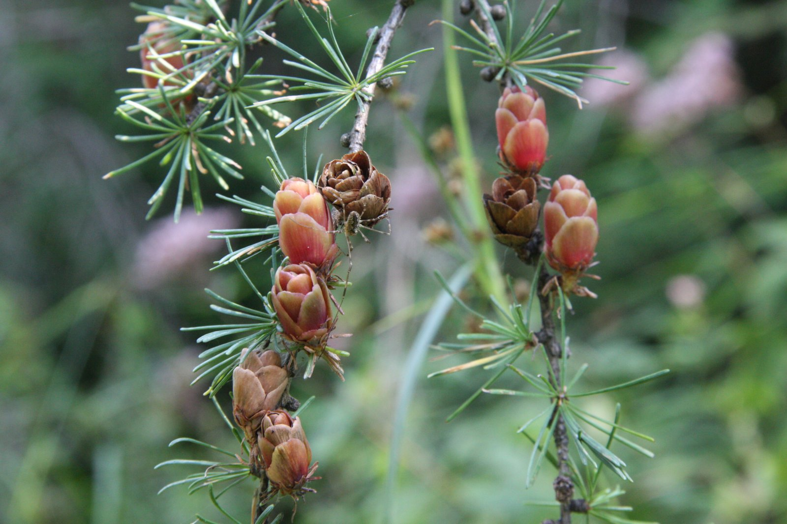 Larix laricina foliage and cones